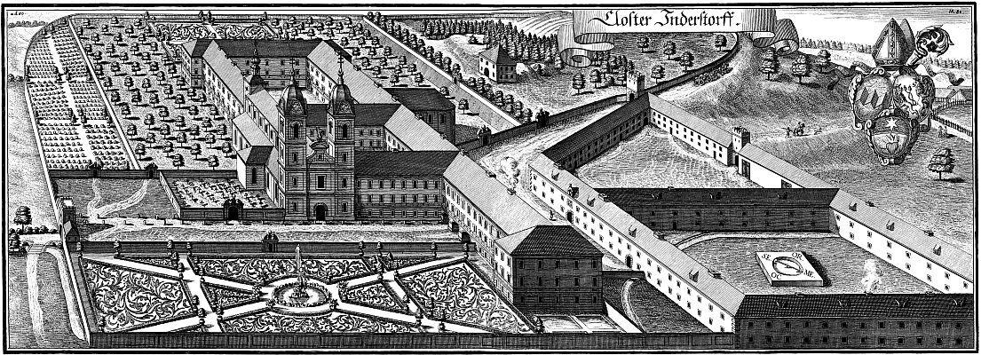 Kupferstich des Klosters Indersdorf von Michael Wening in der Topographia Bavariae um 1700